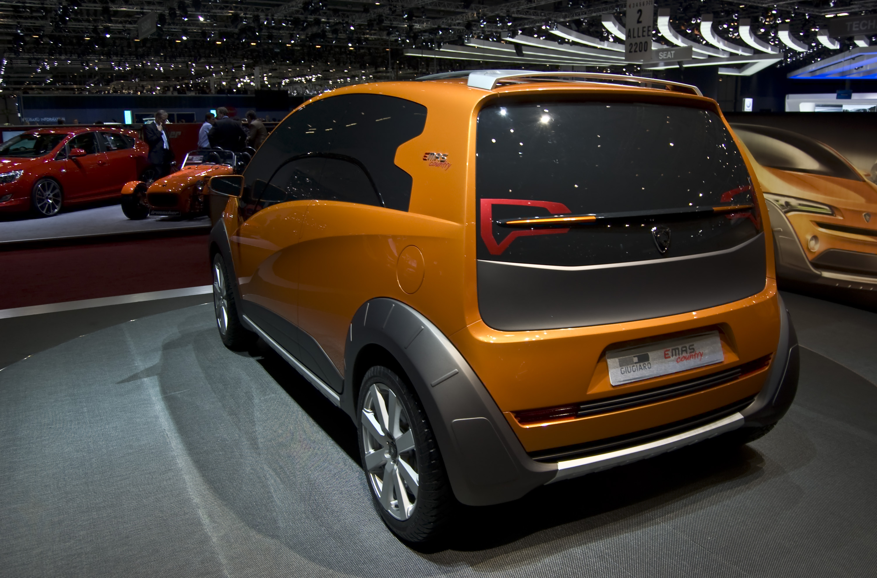 Giugiario Proton EMAS3 en el Salón de Ginebra 2010.